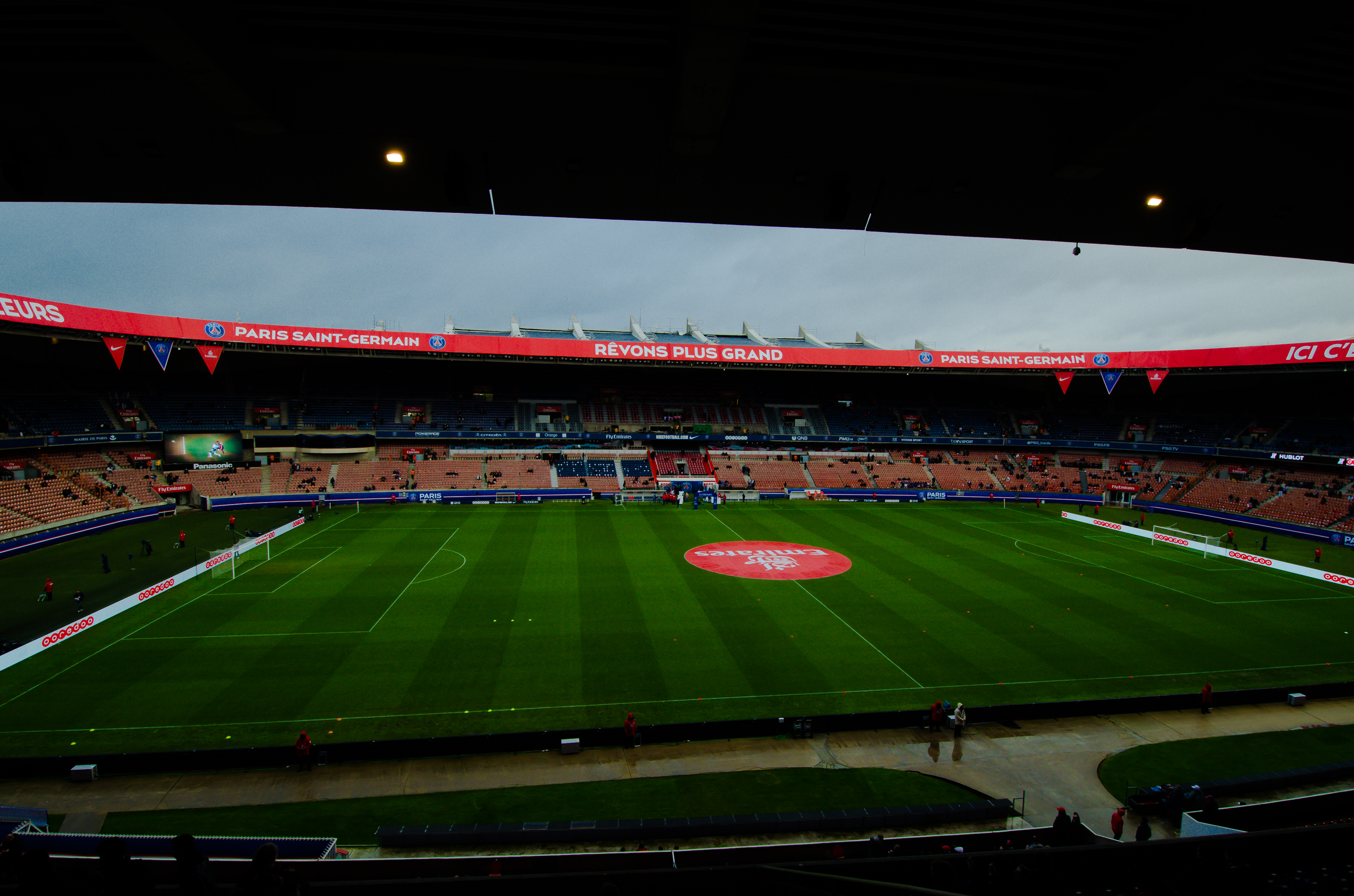 Parc des Princes - Tribune Borelli - 09.11.2013 PSG vs OGC Nizza